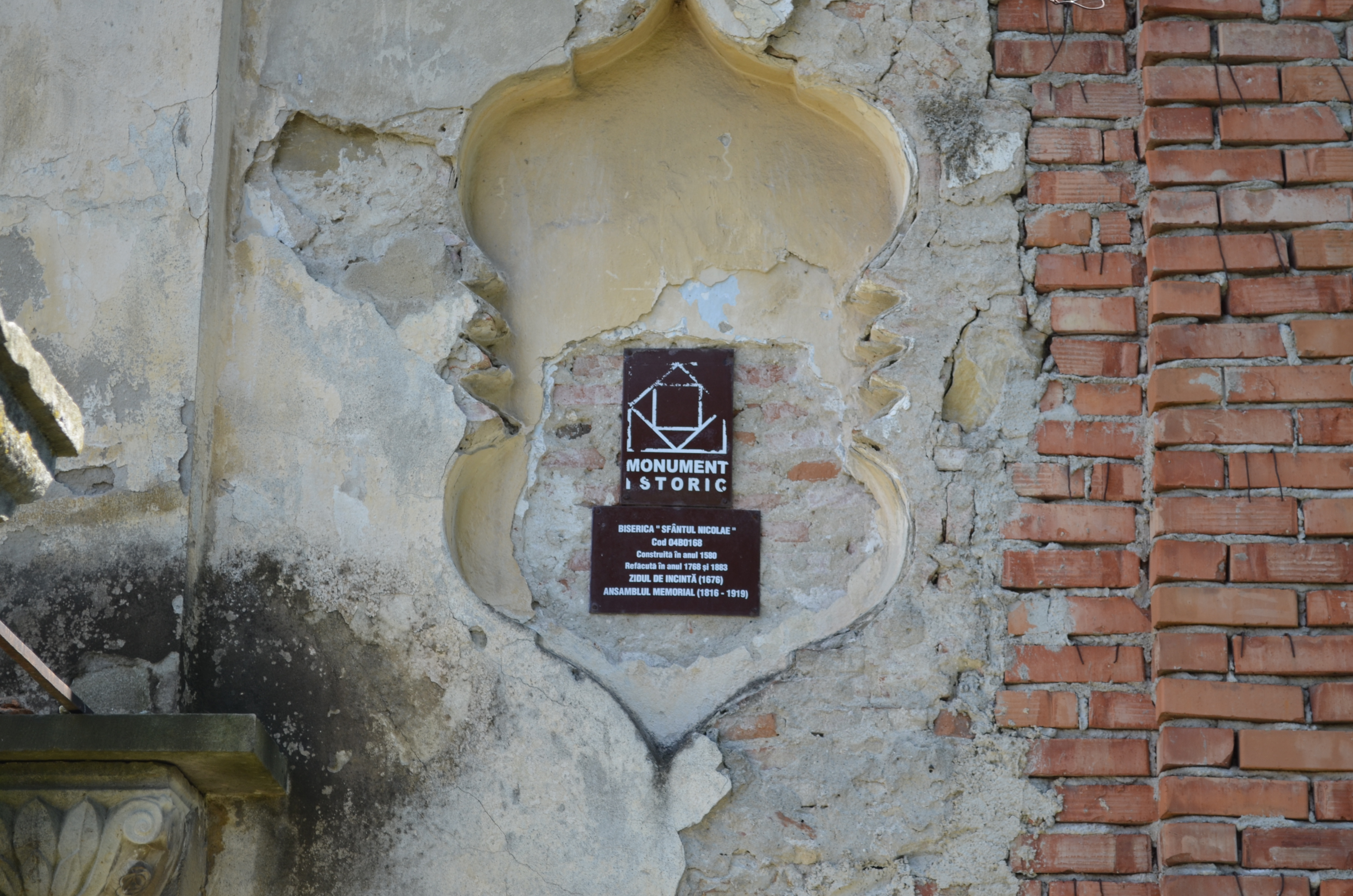 Detaliu al Bisericii "Sfântul Nicolae" din Târgu Ocna 01